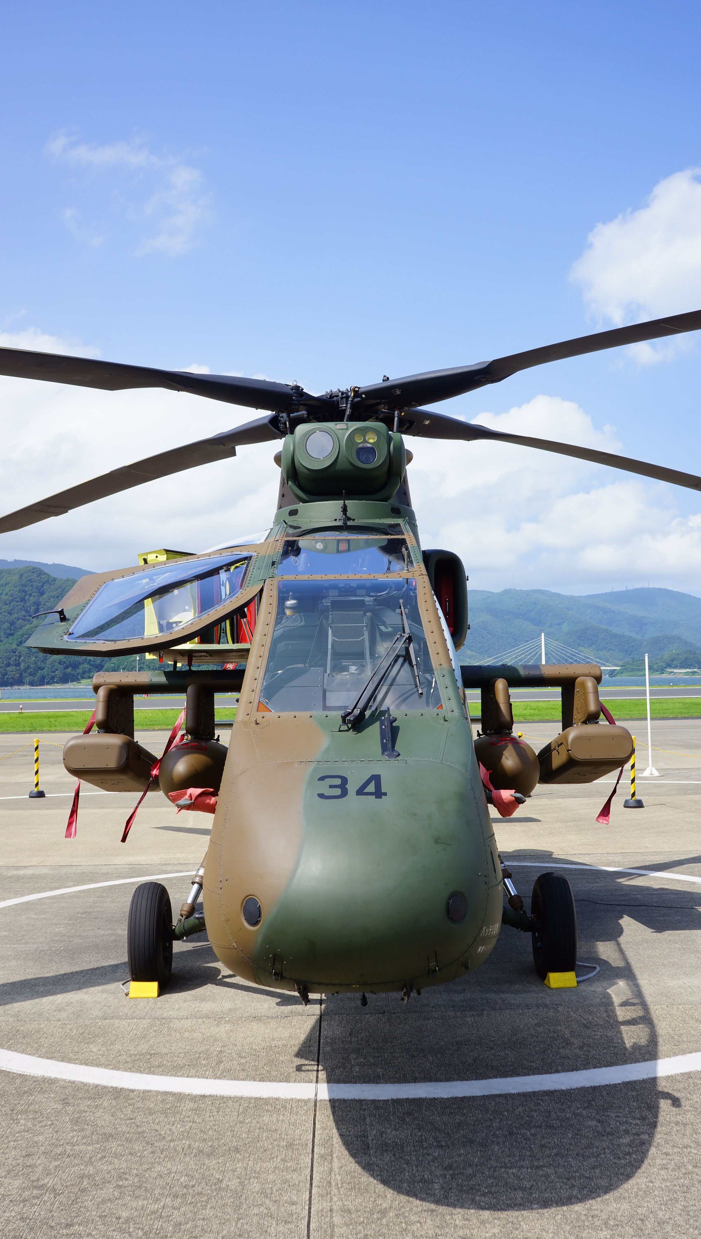 陸上自衛隊 OH-1観測ヘリコプター（32634号機） 正面。2014年7月27日 海上自衛隊舞鶴航空基地にて。